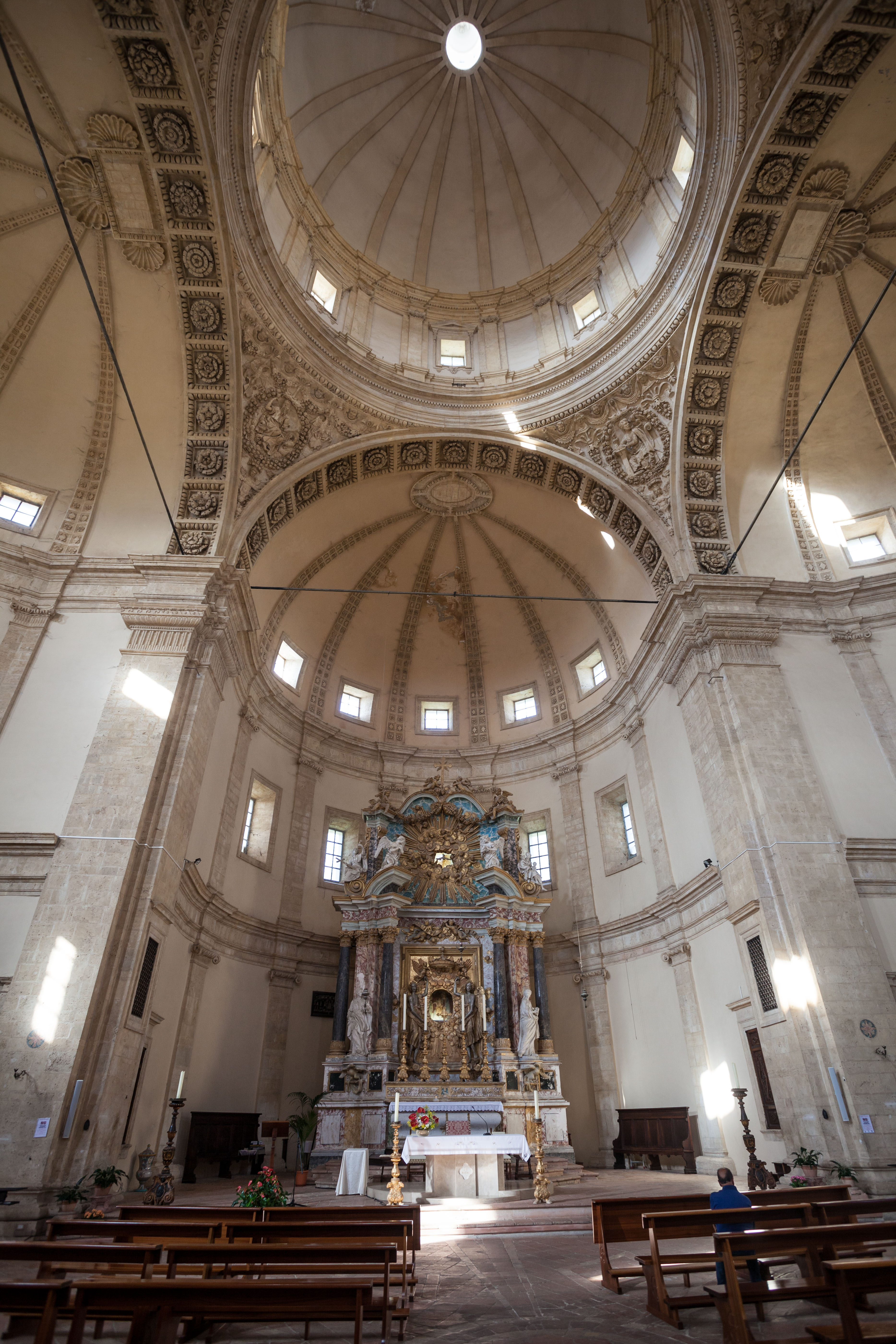 Todi, Tempio di Santa Maria della Consolazione This is a photo of a monument which is part of cultural heritage of Italy.